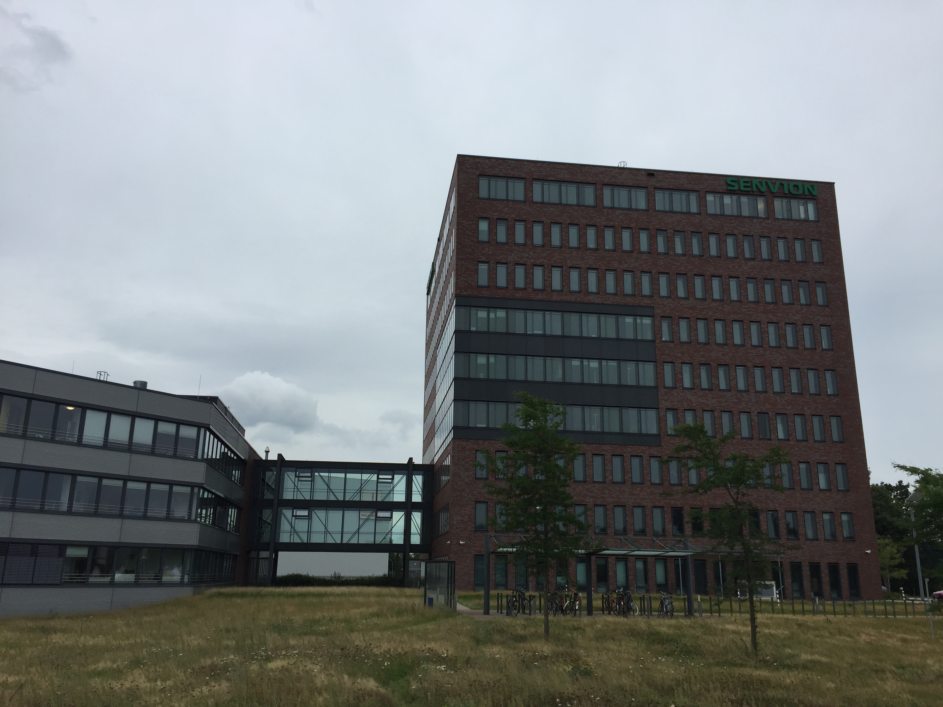 Senvion Verwaltungsgebäude